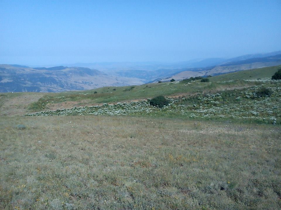 گياه دارويي بالديرغان در آرپاچوخوري روستاي خان كندي شهرستان گرمي